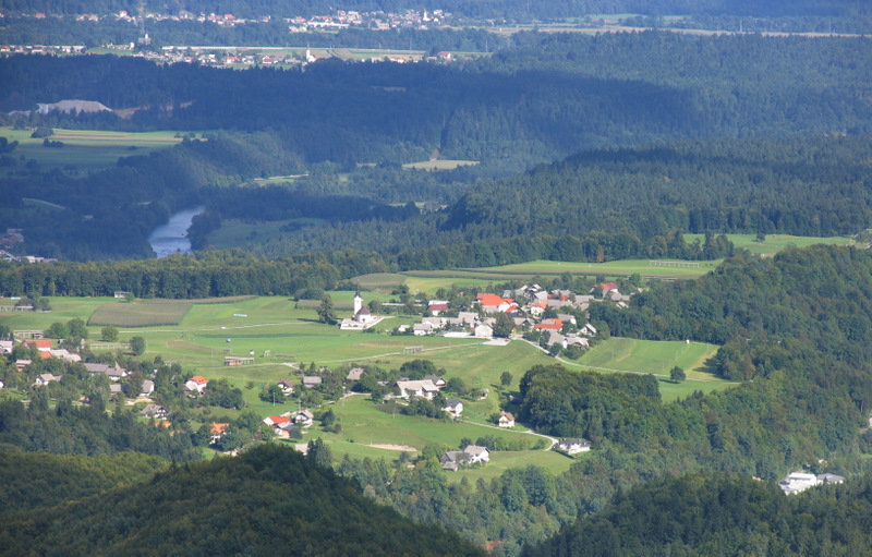 Pogled na Zgornjo in Srednjo Dobravo s Suherne